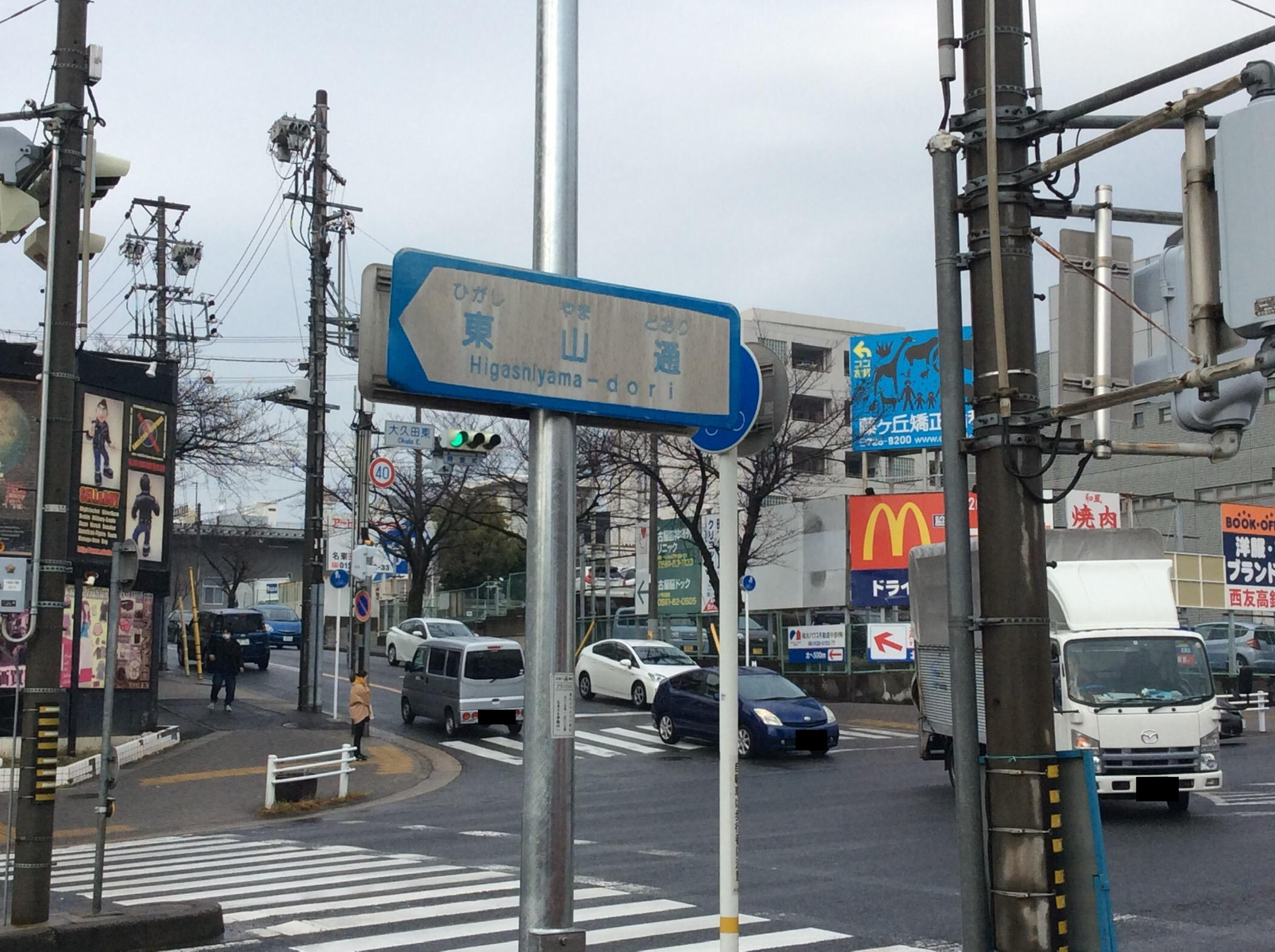 「大久田東」交差点の南西（長久手市）側より撮影した「東山通」起点の標識